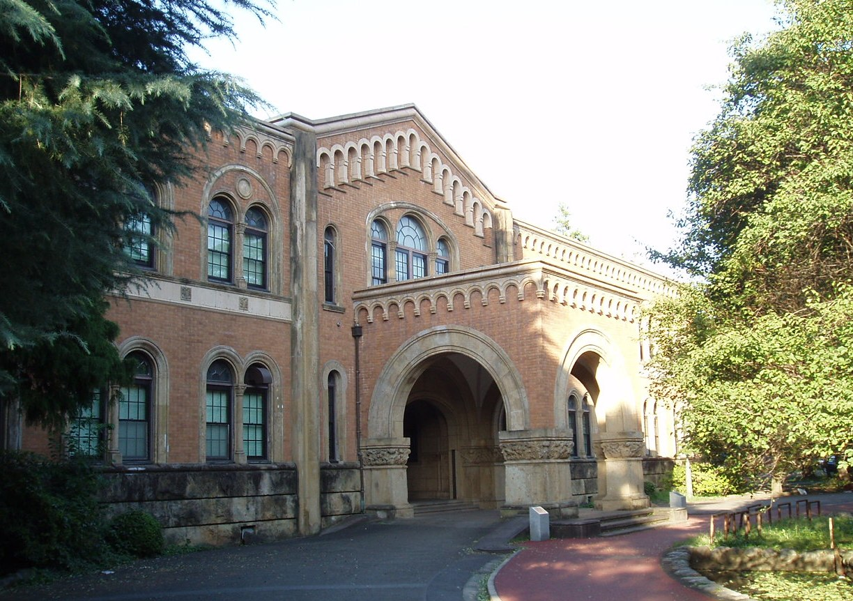 一橋大学 国立キャンパス東本館（旧東京商科大学商学専門部）。2006年10月。投稿者自身による撮影。